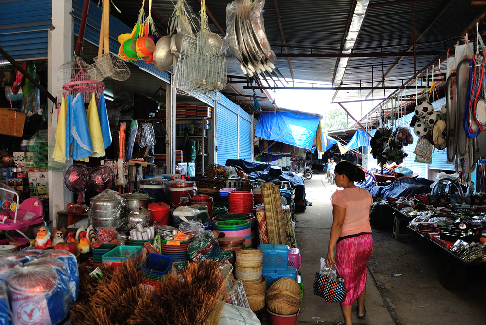 Nikon 1 J1